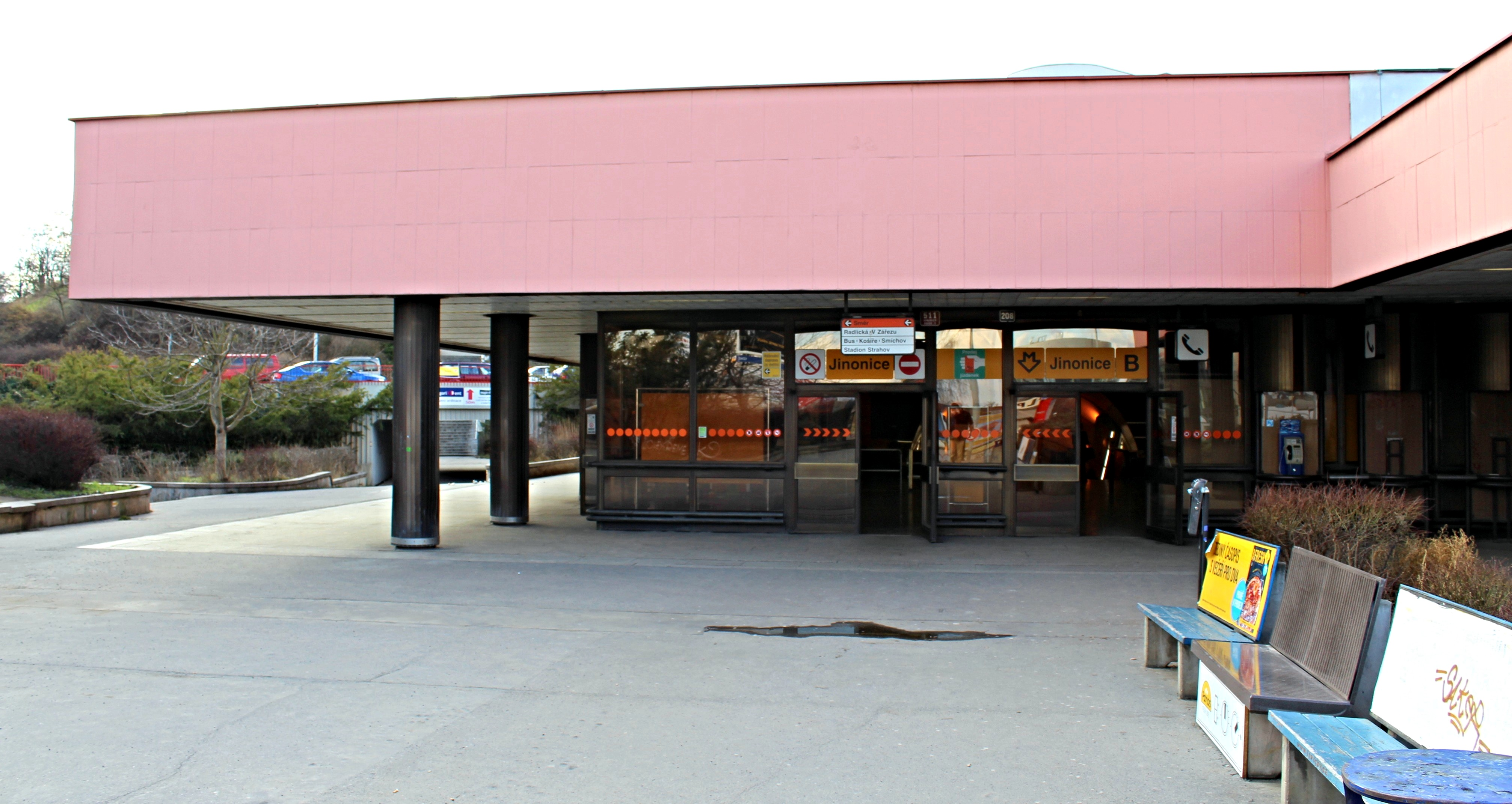 Jinonice metro